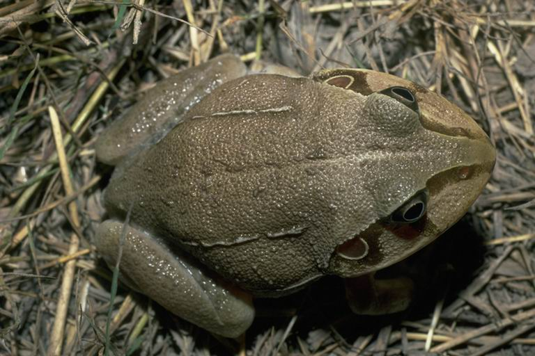 Cyclorana novaehollandiae